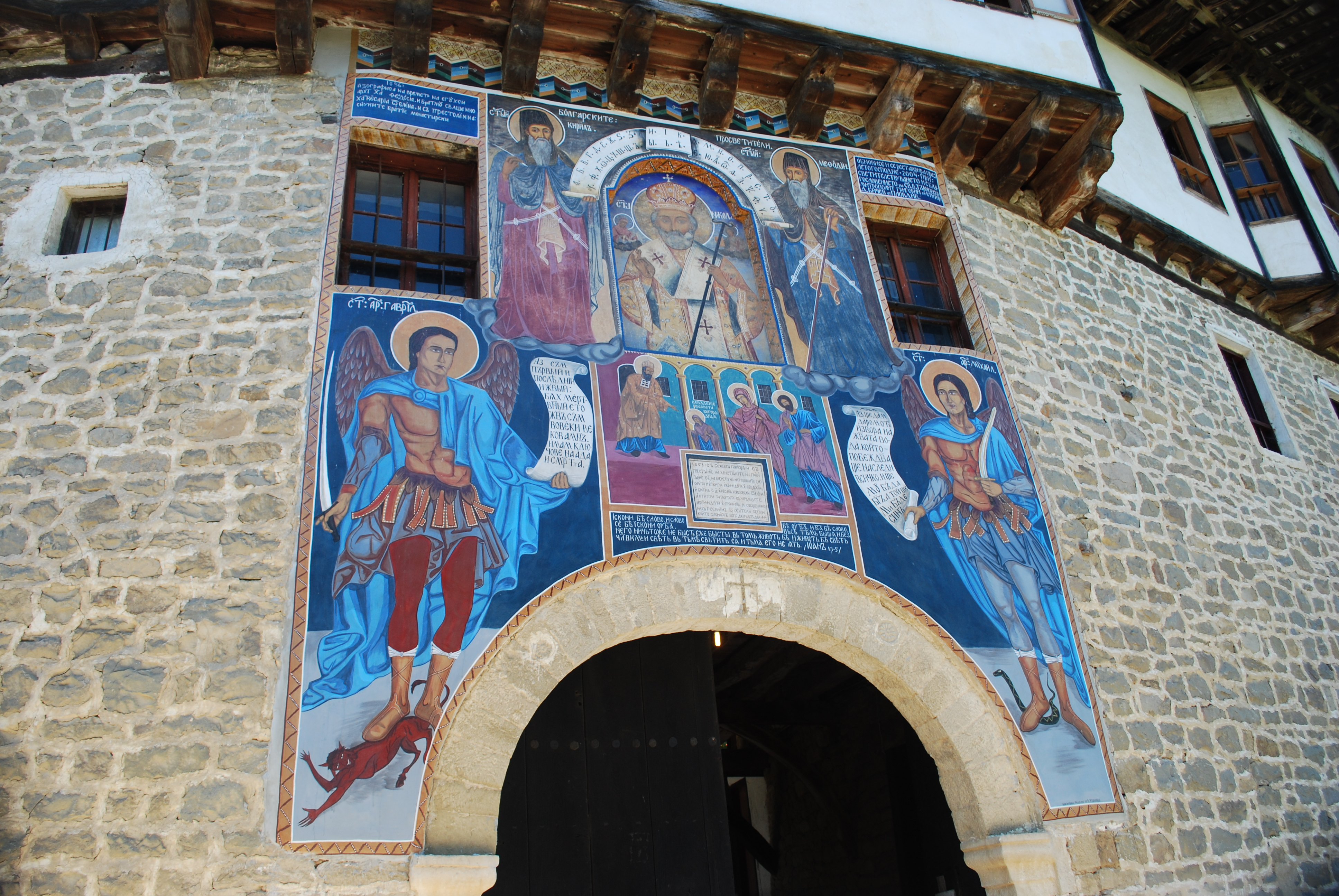 Kapinovski monastery - Къпиновският манастир „Свети Никола“